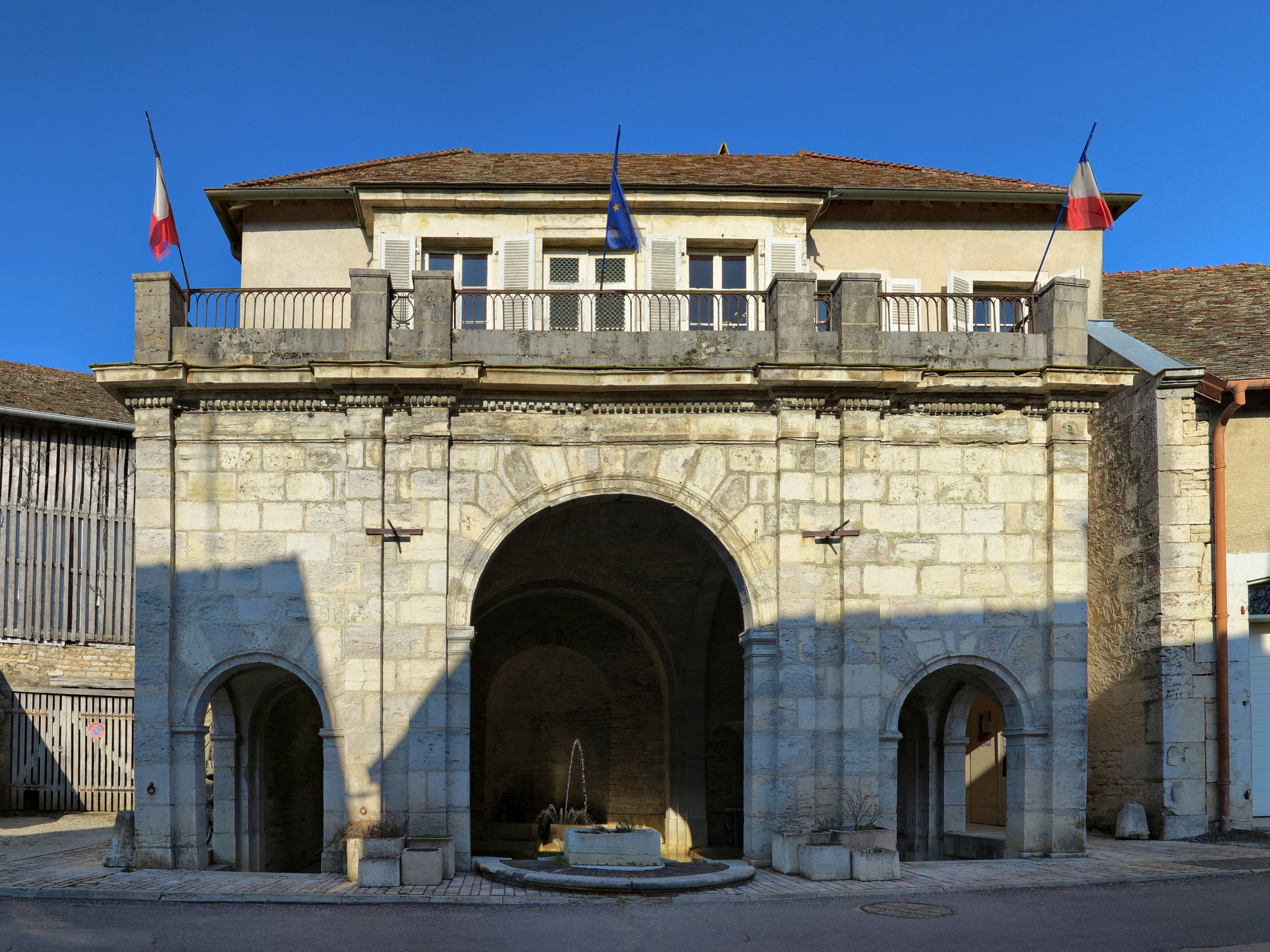 Mairie-lavoir de Bucey-lès-Gy